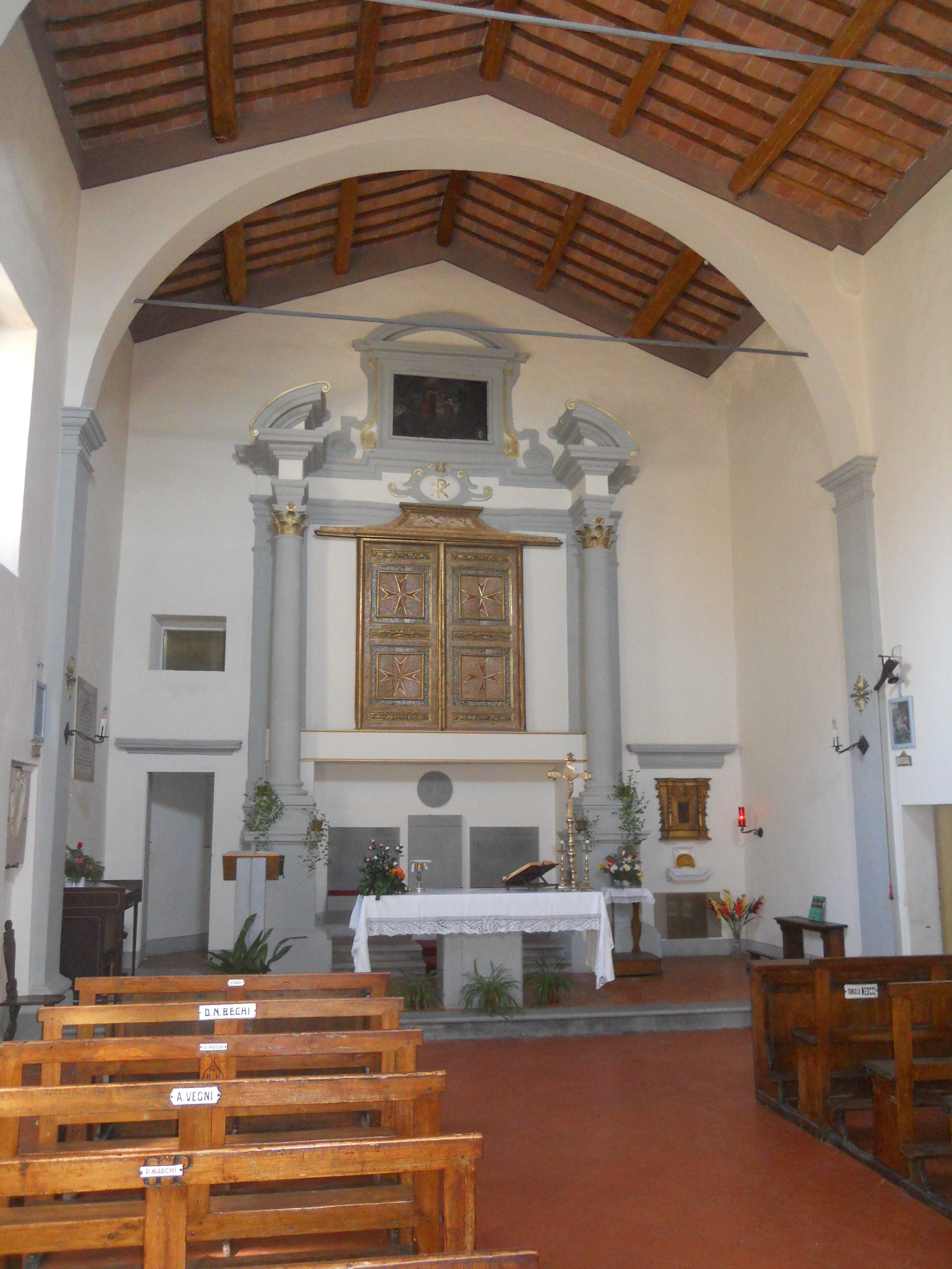 Interno della pieve di San Giovanni Battista a San Giovanni d'Asso.